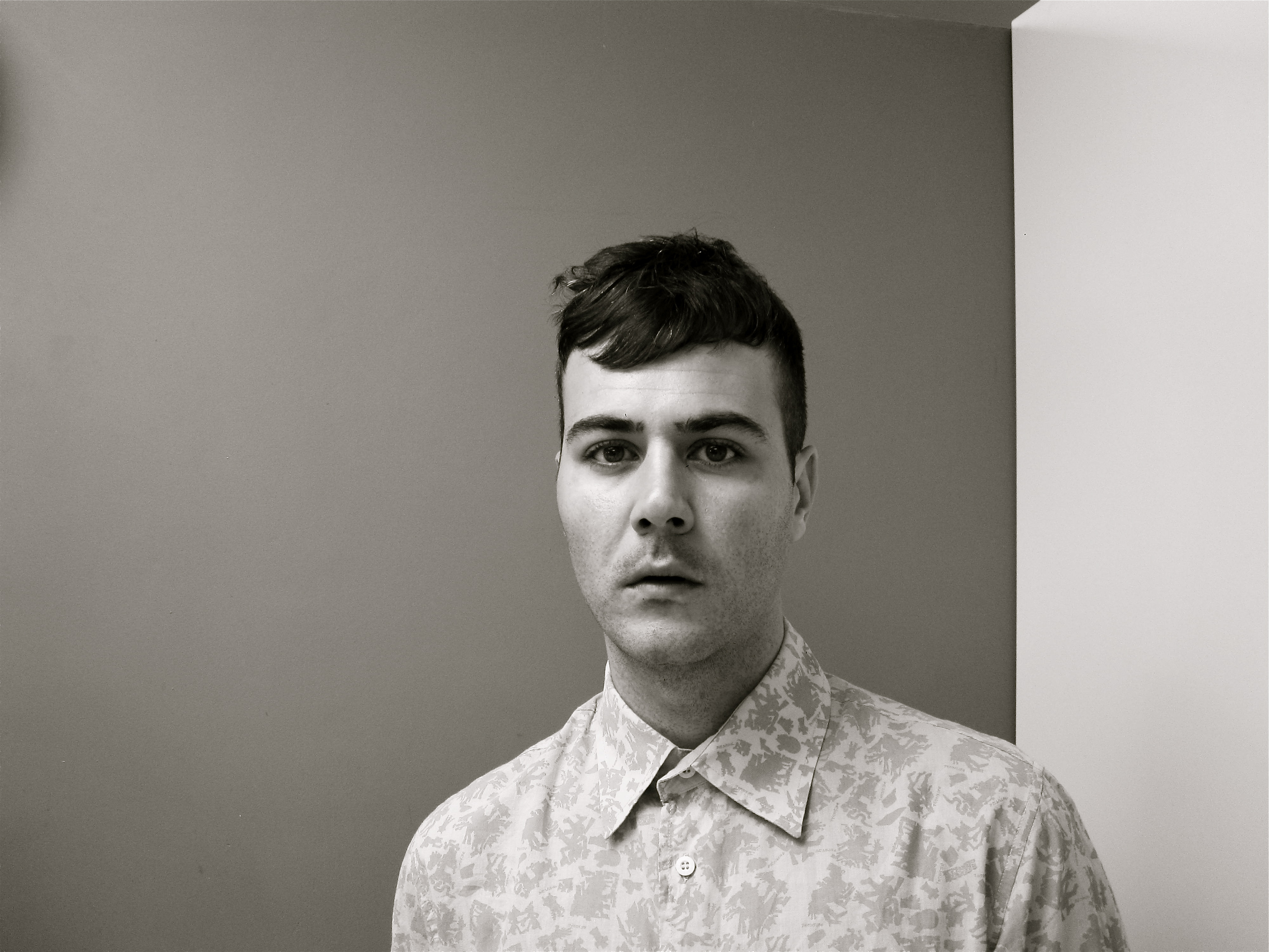 Paco Bezerra